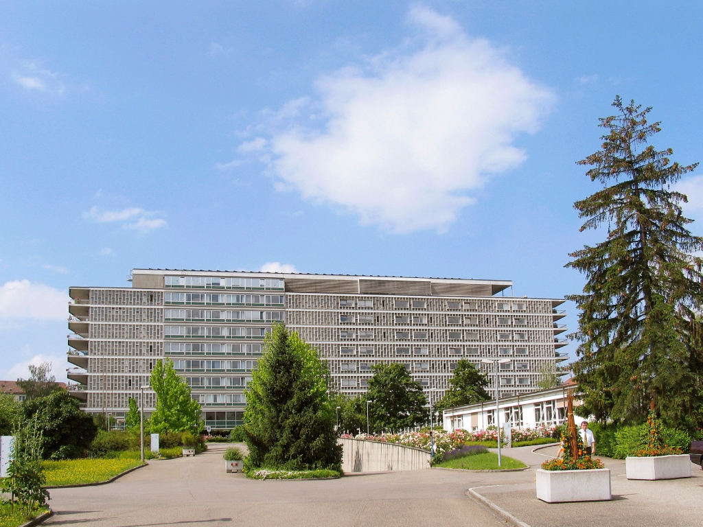 Eine Aussenansicht des Felix Platter-Spitals in Basel